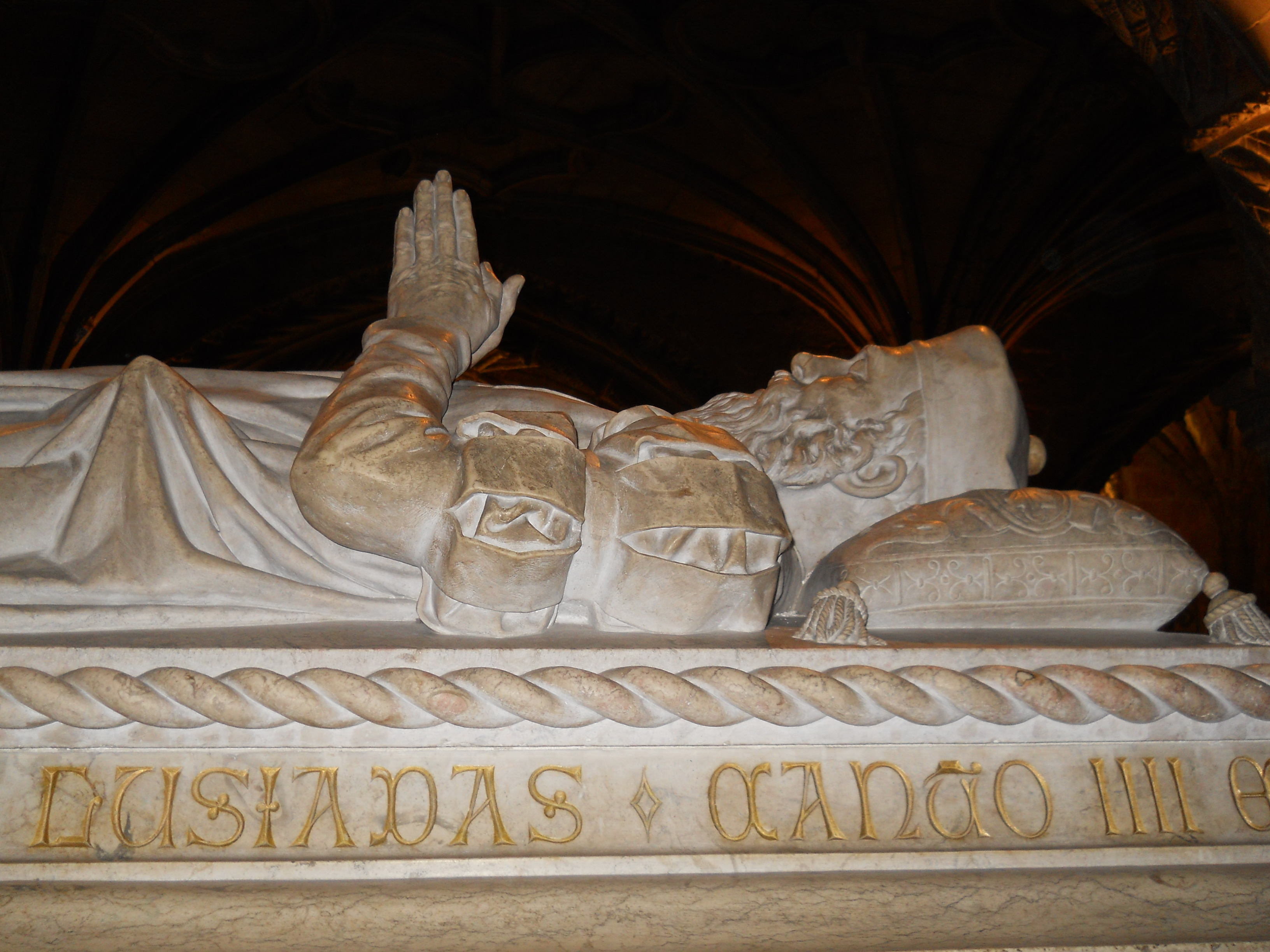 Lisbon Portugal 522 vasco de gama